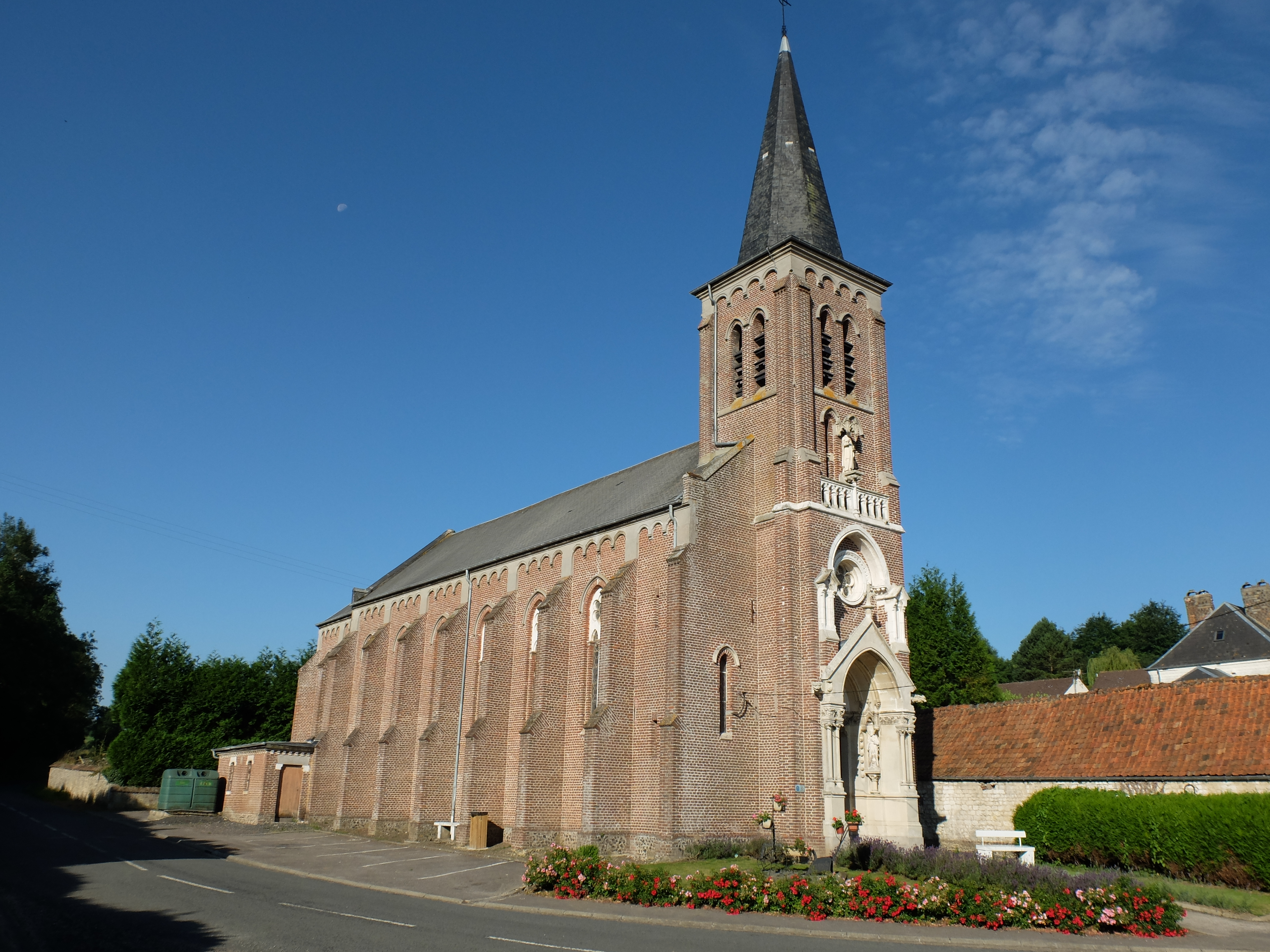 Vue de l'église Saint-Walloy de Beaumerie-Saint-Martin.